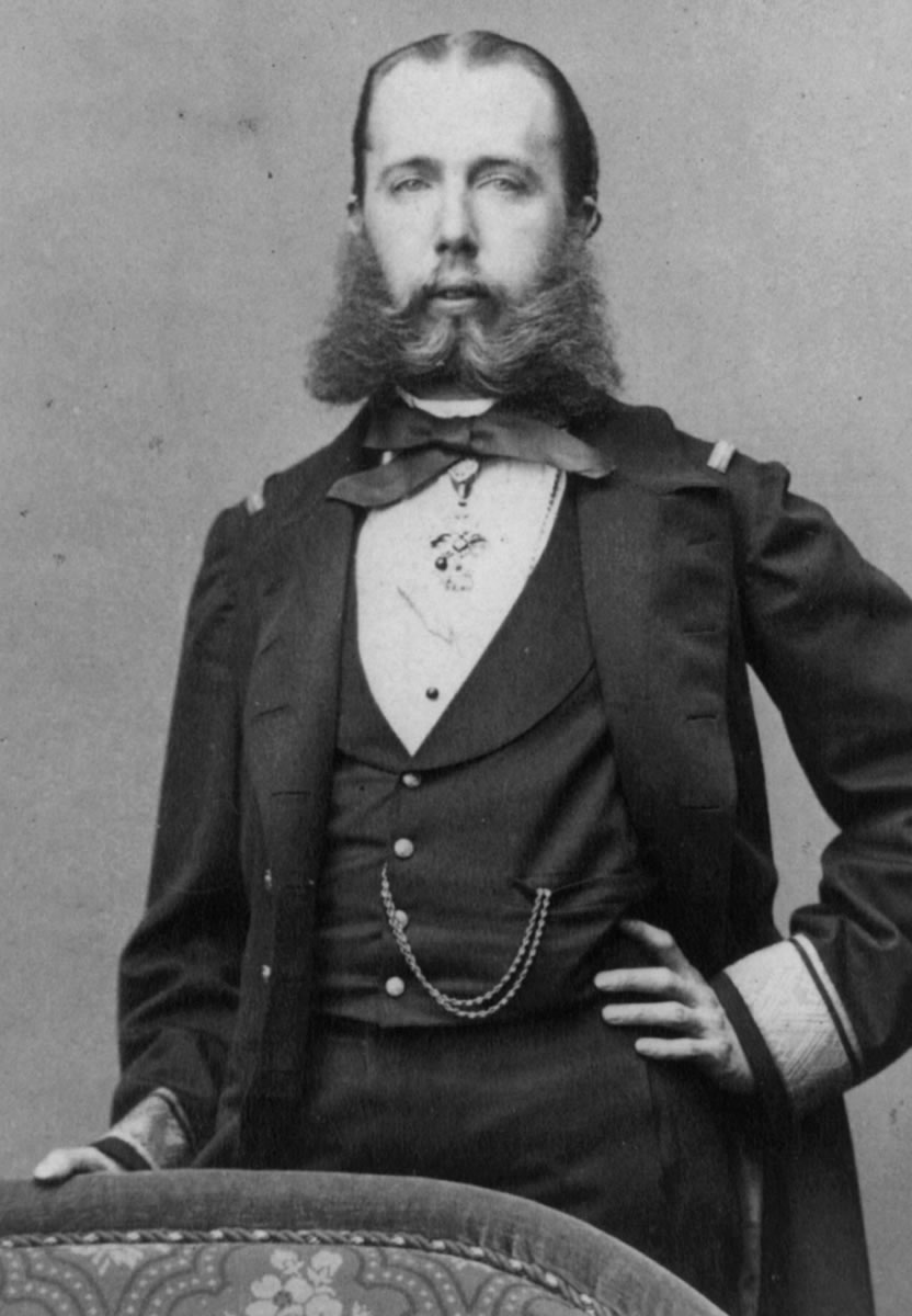 Emperor Maximilian I of Mexico, circa 1857-1867.